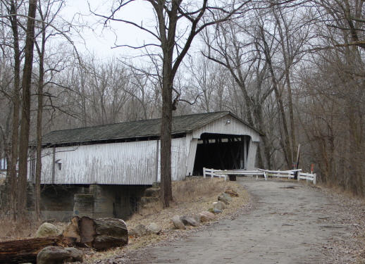 Darlington, Indiana